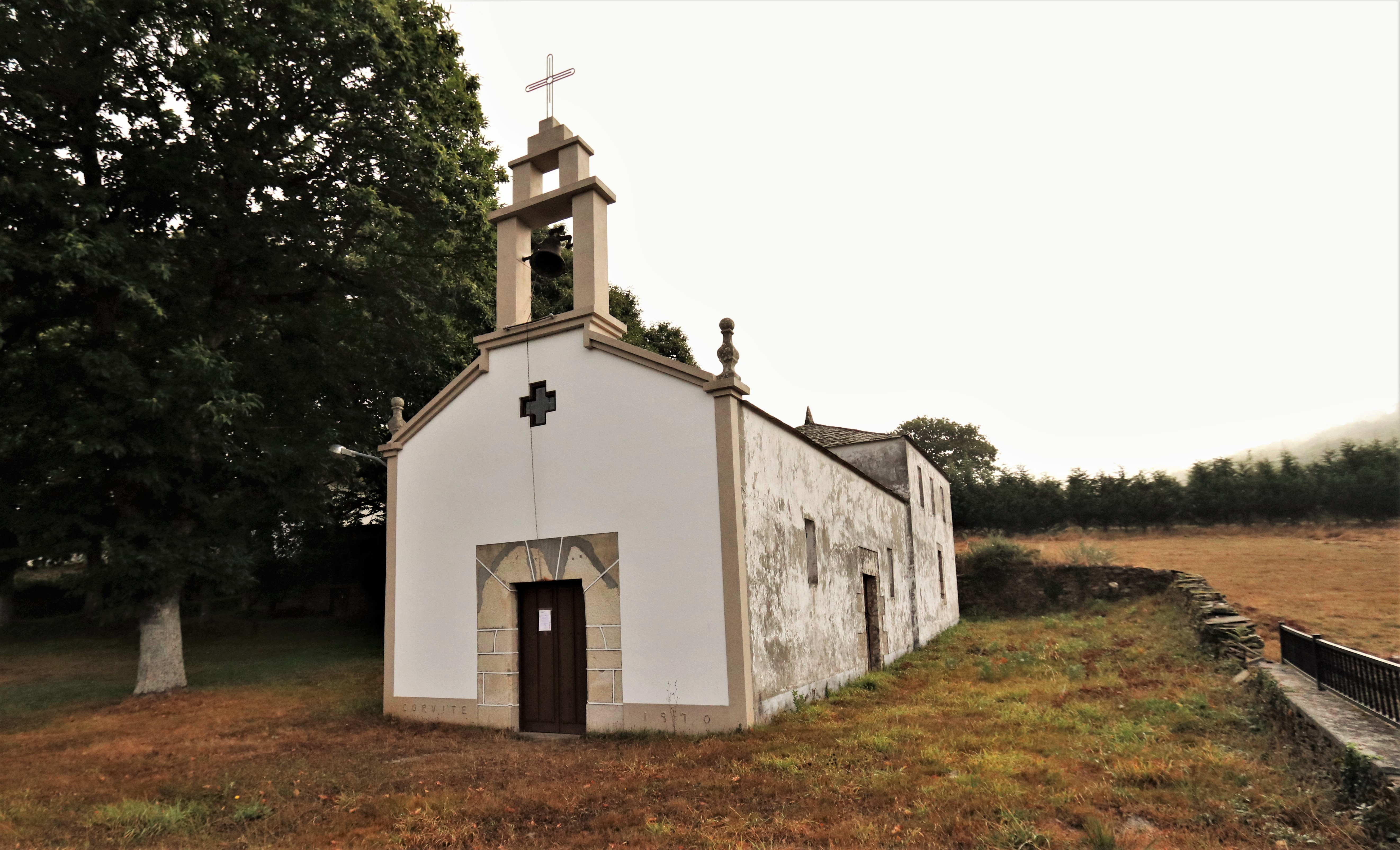 Igrexa de Corvite, Abadín.